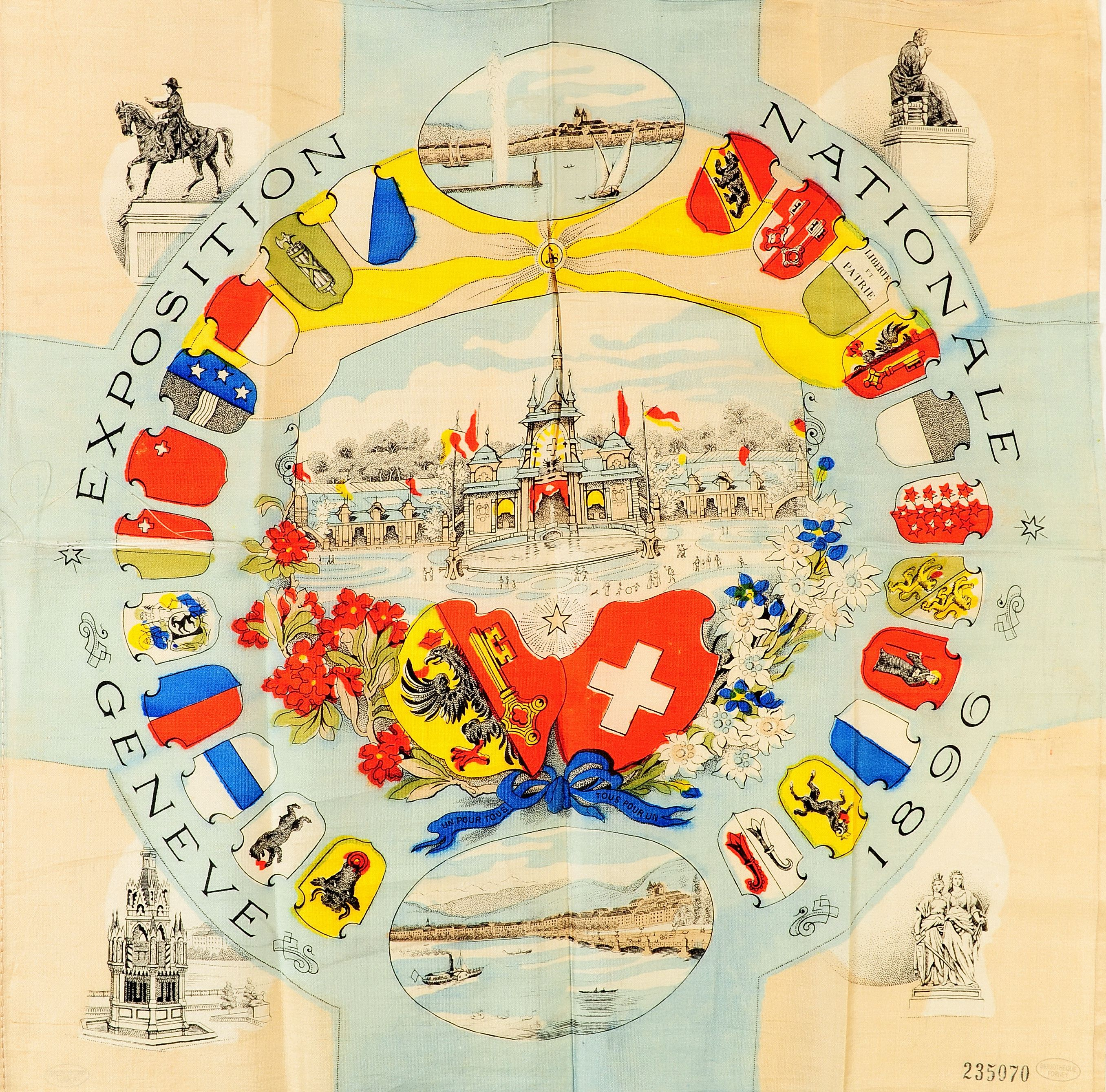 1 mouchoir imprimé, édité lors de l'Exposition Nationale de 1896 à Genève. Impression lithographique sur soie , polychrome, fond blanc écru et bleu ciel ; 41 x 41 cm. Bibliothèque Forney, TI 235070 PF